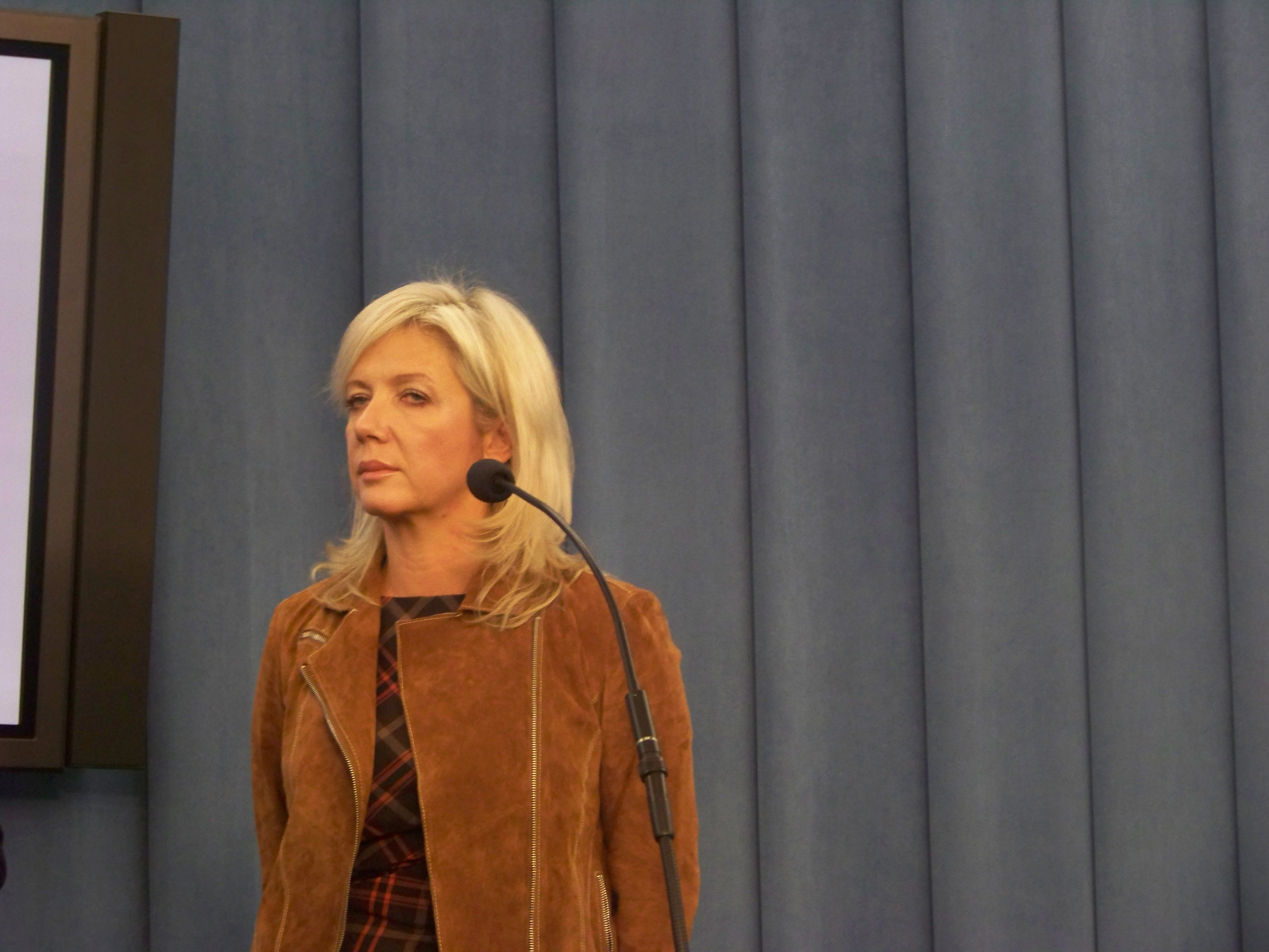 W Sejmie RP, 7 listopada 2012.